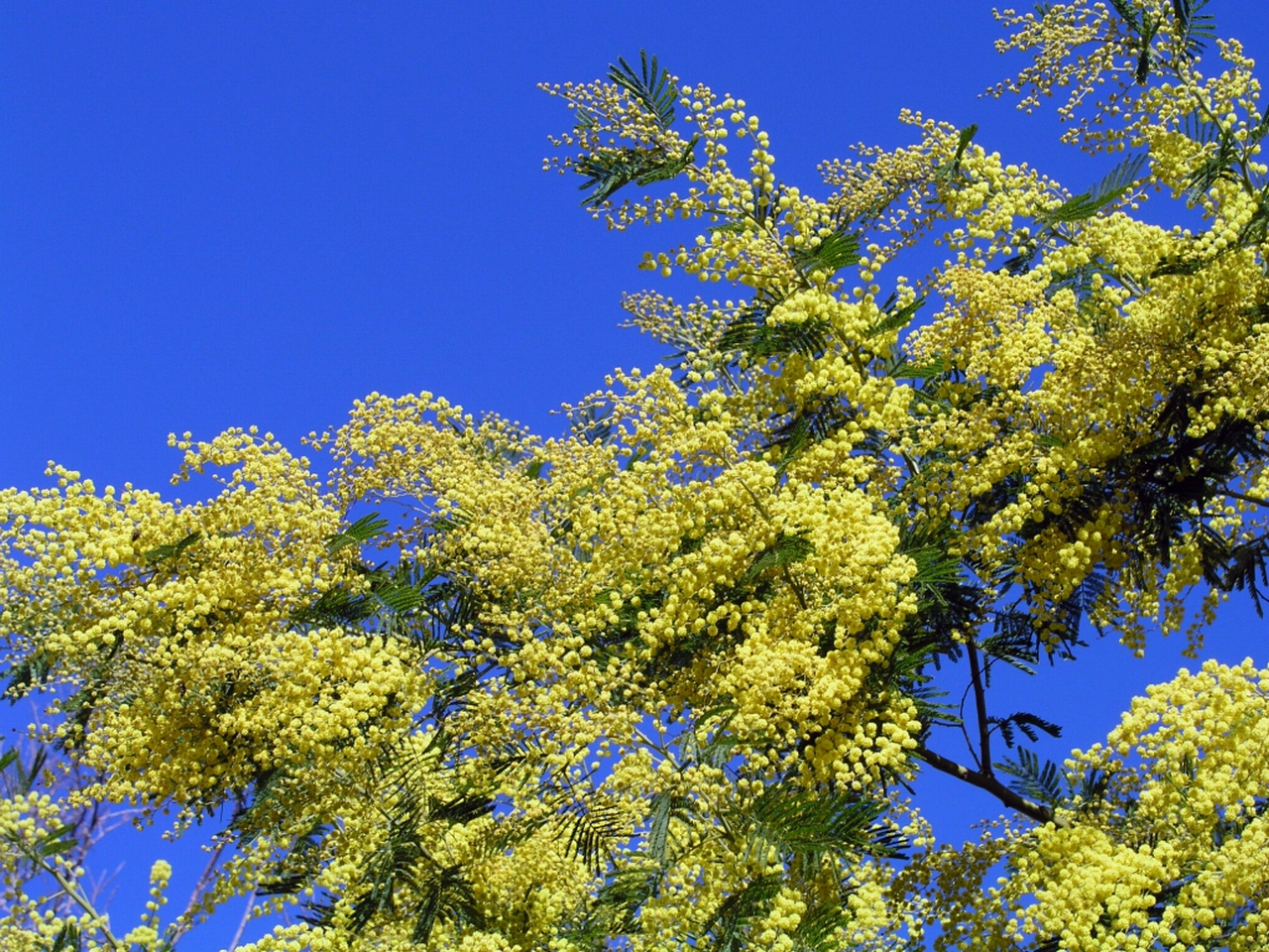 Mimoza